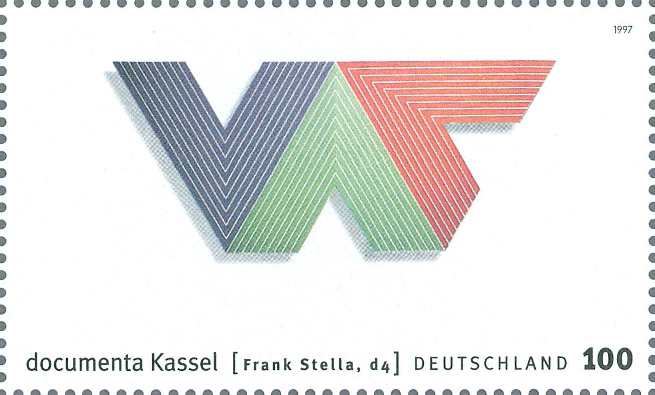 Stamp for documenta x Picture Frank Stella d4